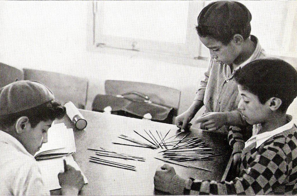 ילדים משחקים he:דוקים בתמונה משנות החמישים המוקדמות